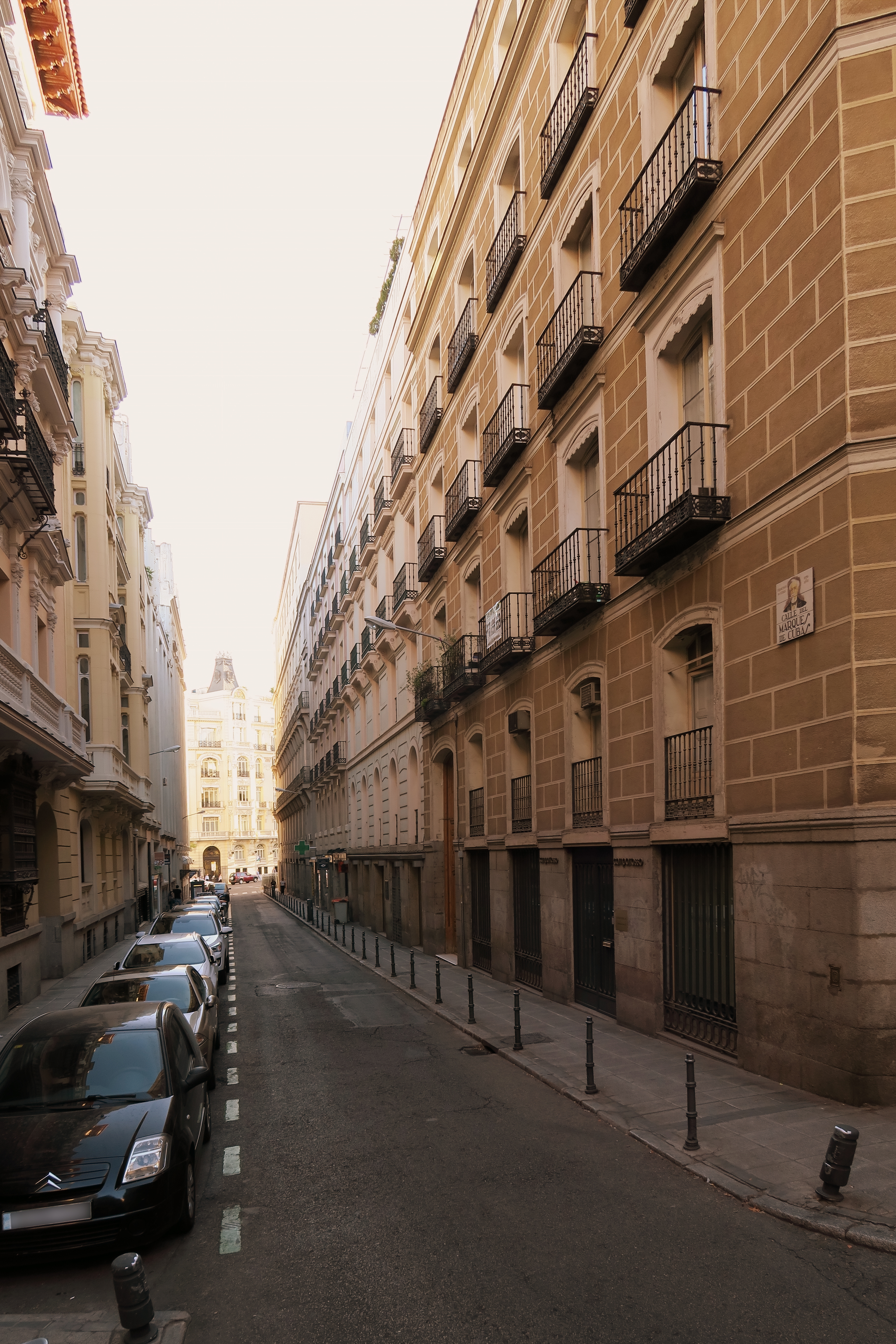 Calle del Marqués de Cubas, desde la calle Zorrilla